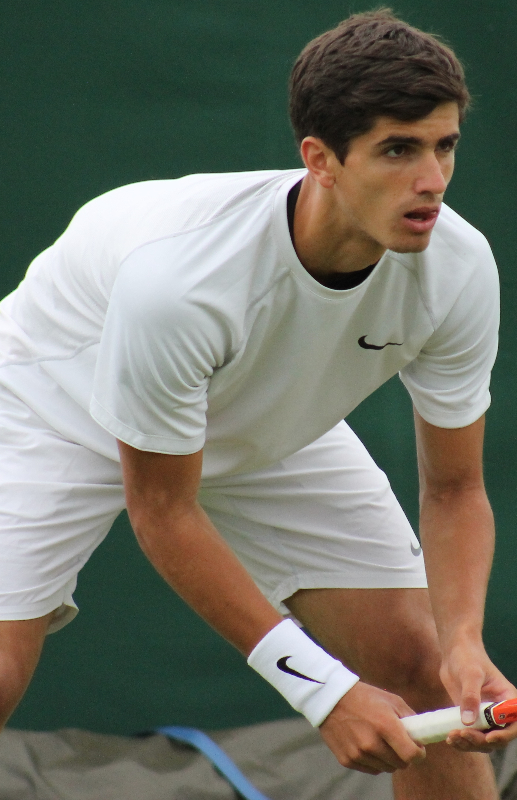 Herbert WMQ14 (7)